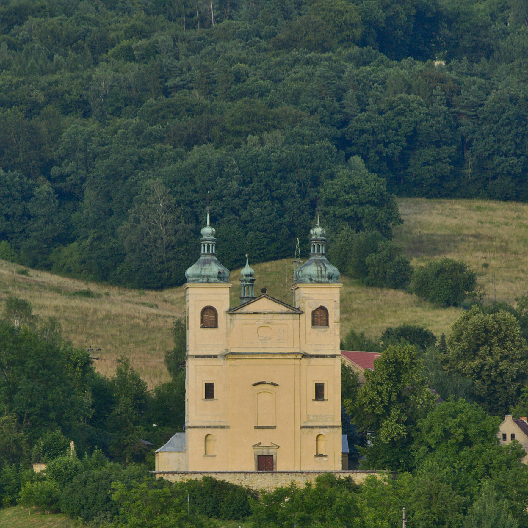 Kostel svatého Vavřince, Nebočady, Děčín